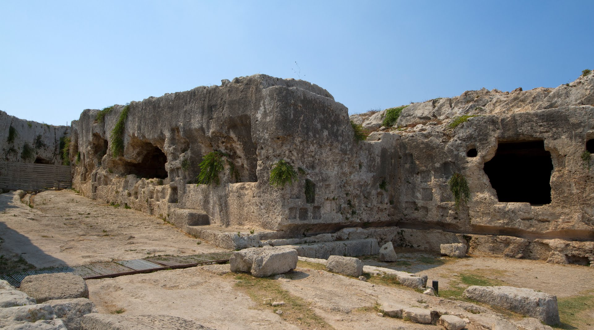 Via dei Sepolcri - Siracusa